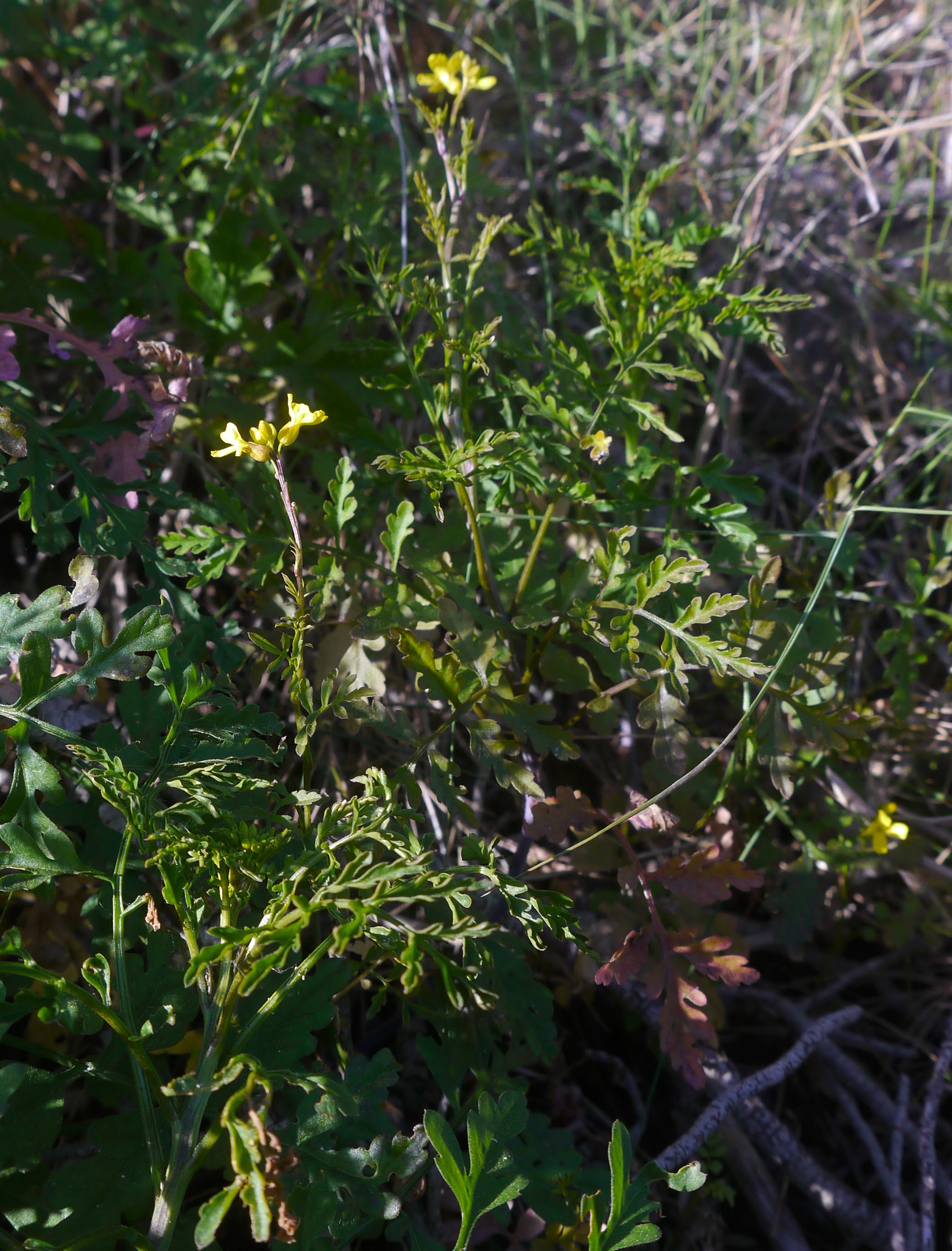 Succowia balearica en la Sierra de La Muela, Cartagena, España.